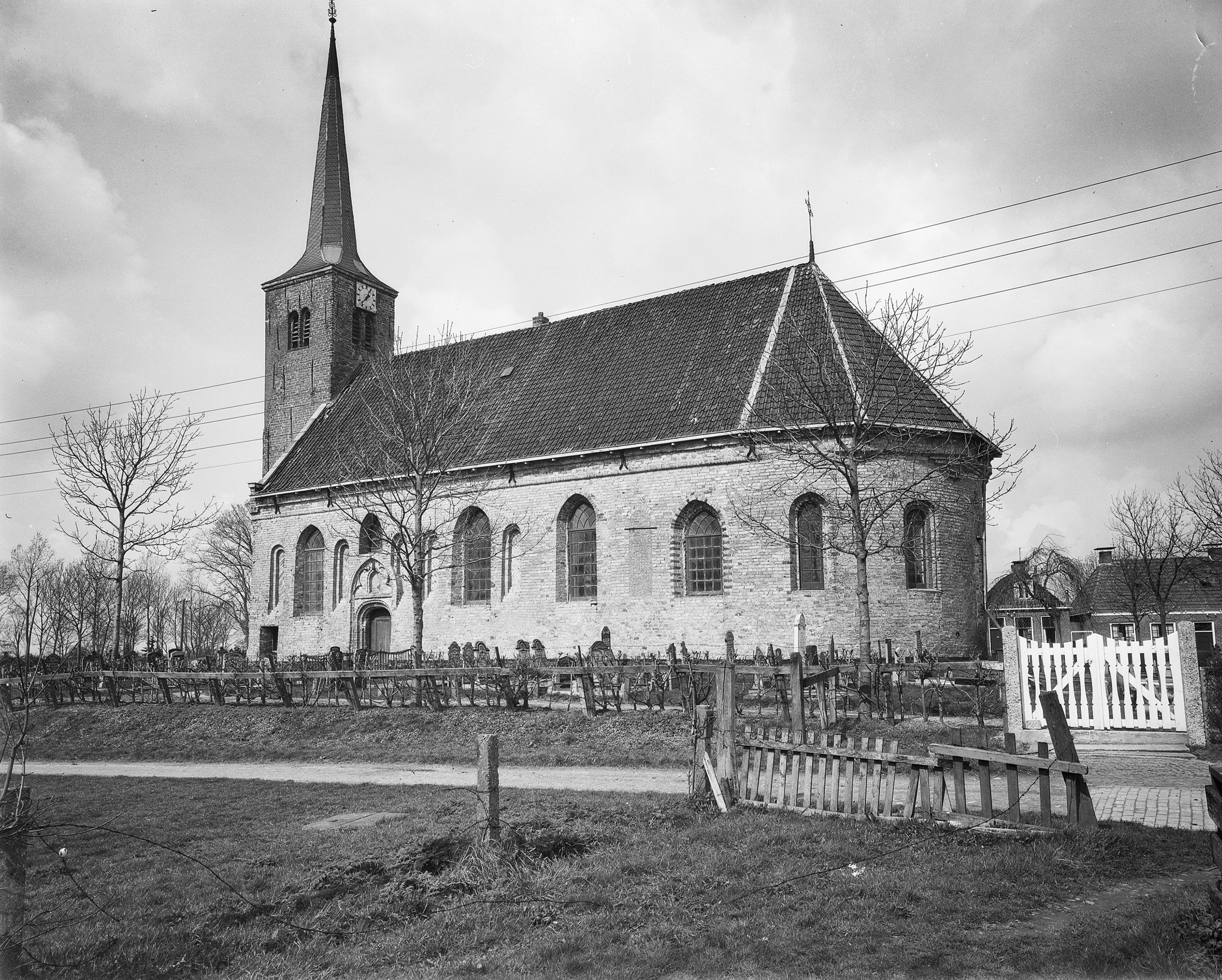 Nederlands Hervormde Kerk: kerk naar het noorden